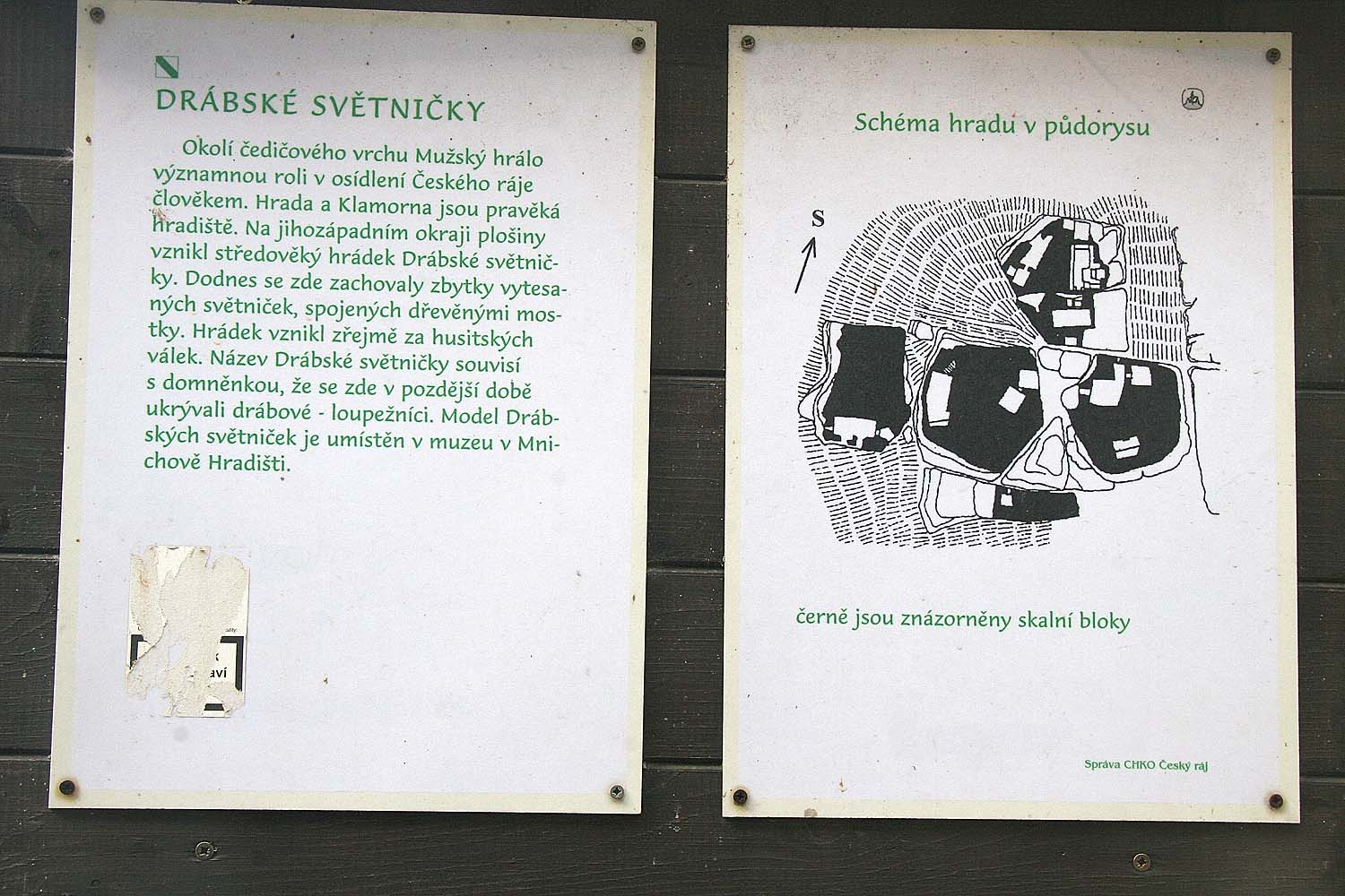 Schema skalního hradu Drábské světničky autor:Prazak date:11. 3. 2007